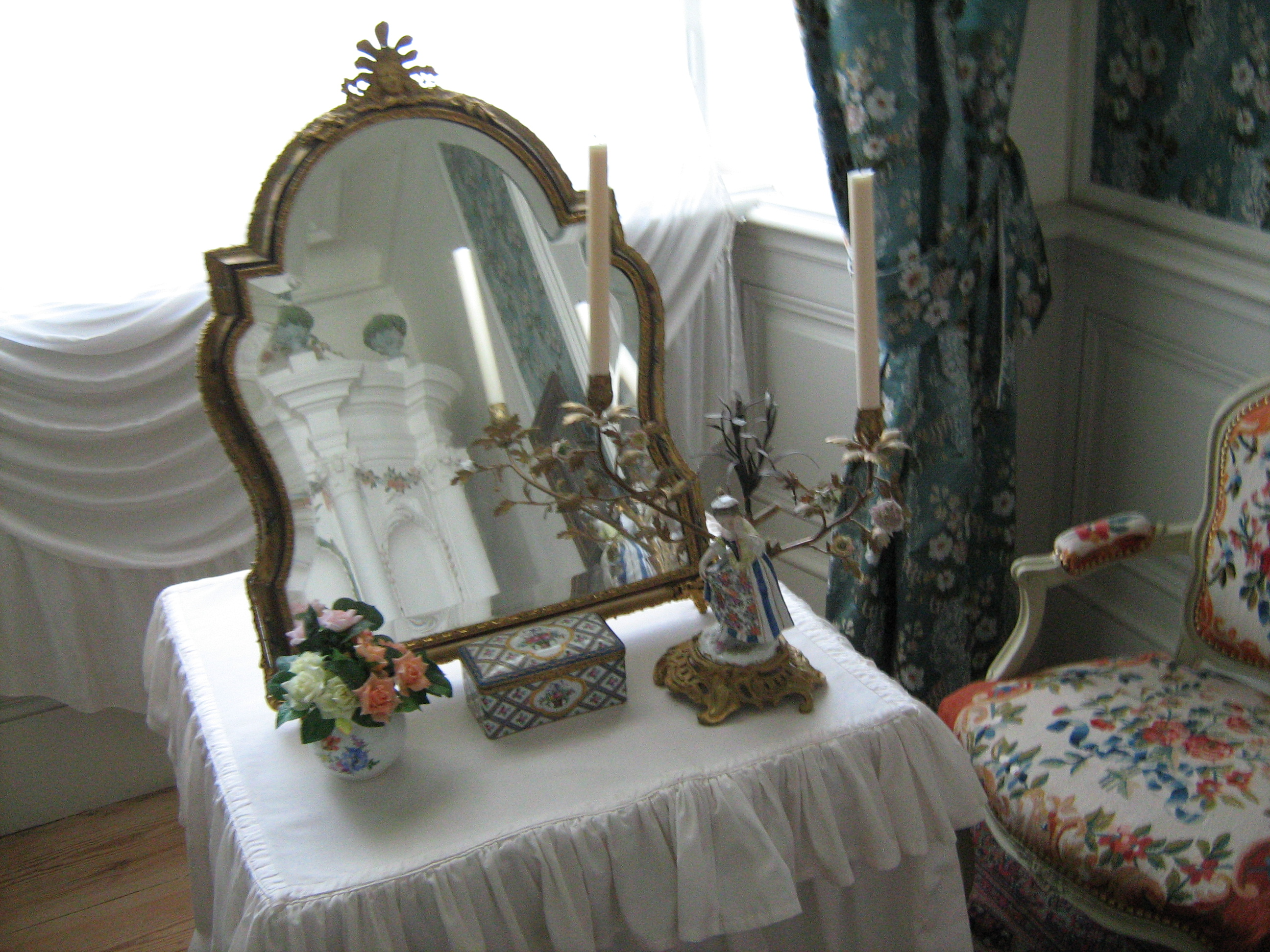 Veidrodis